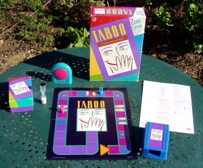 Photo d'une boîte de Taboo prise dans mon jardin